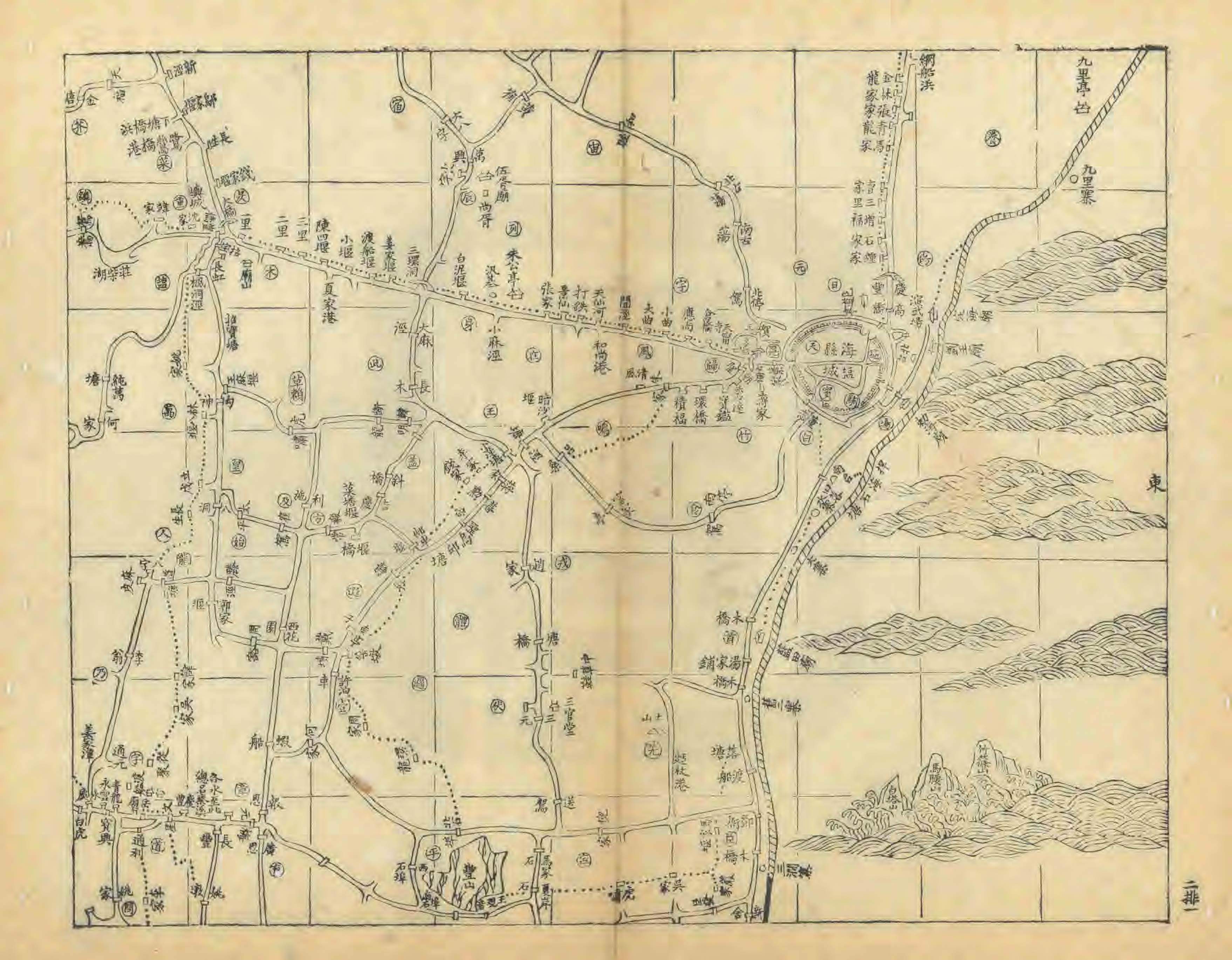 清光绪三年（1877）《光绪海盐县志》县境分图之四，示海盐县城及周边地区。